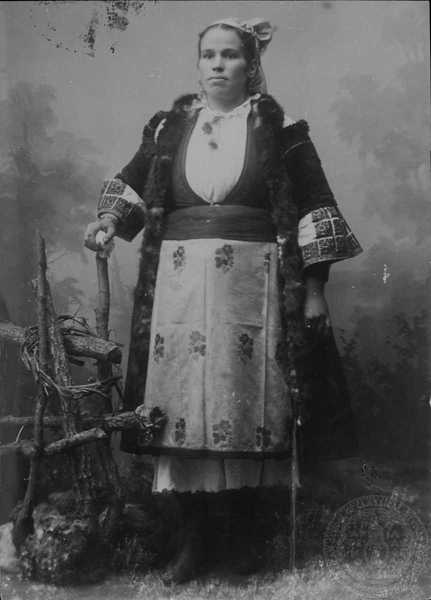 Селянка от Янковец, Ресенско.